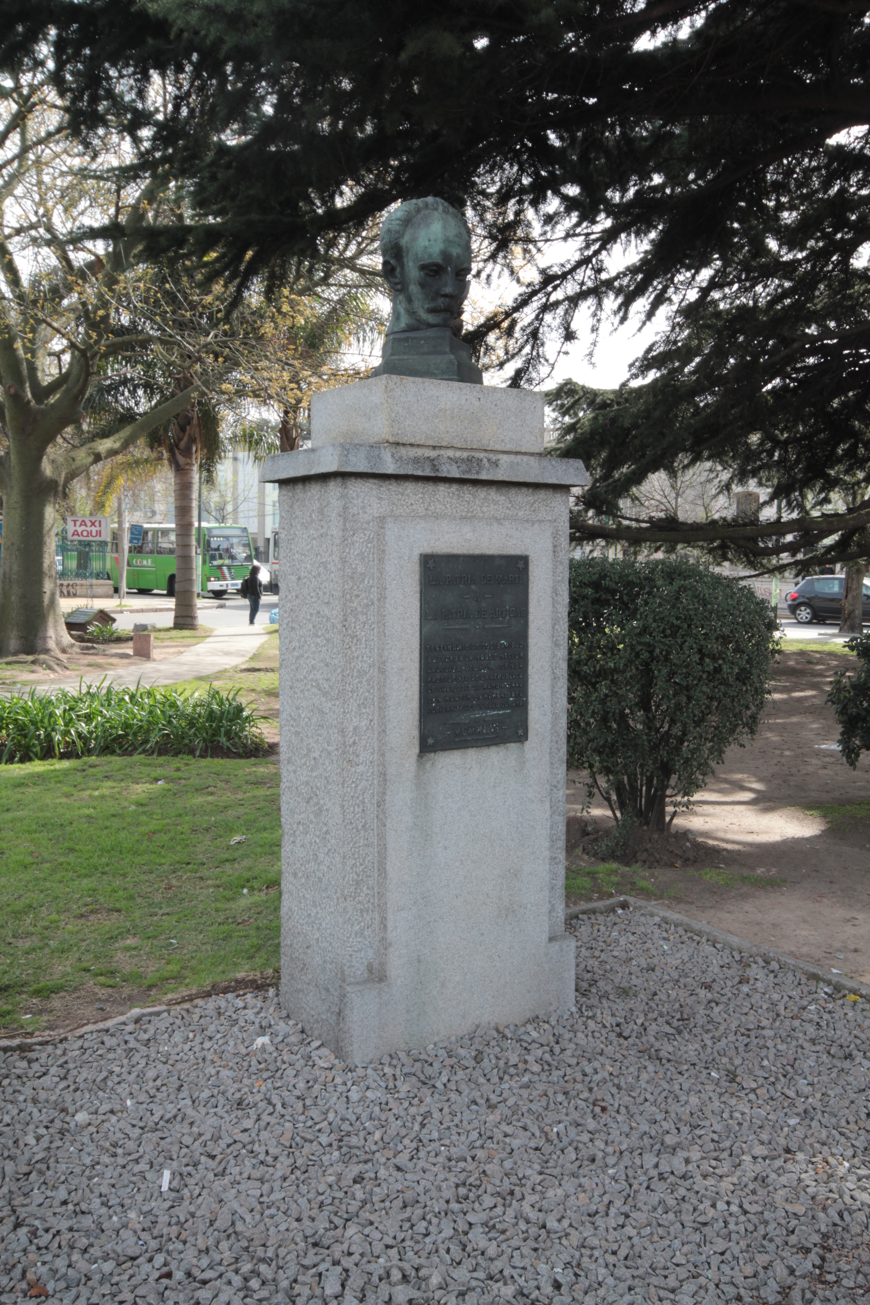 José Martí (busto) ubicado en Montevideo